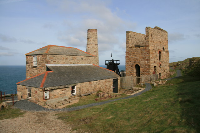 Levant Mine